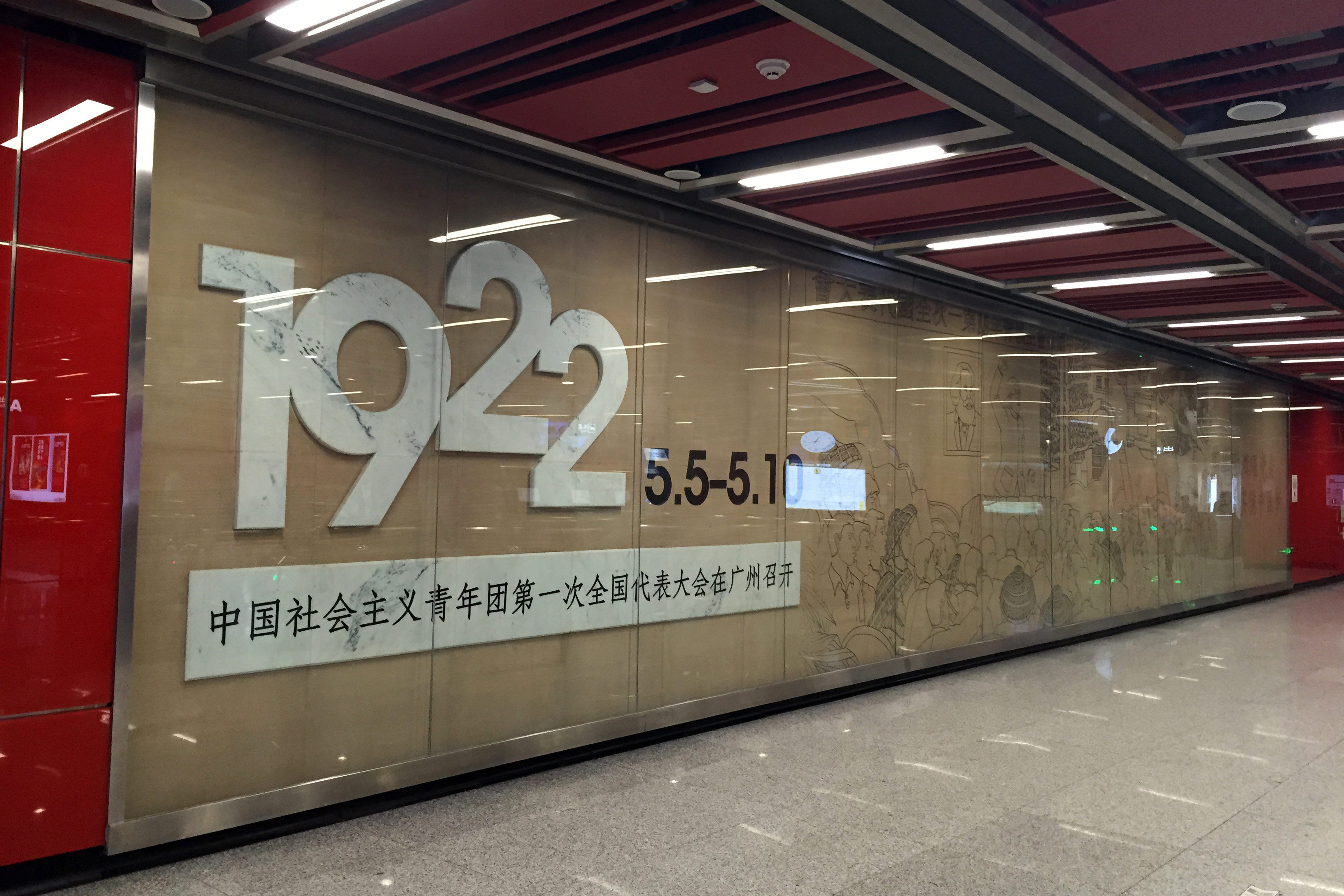 广州地铁团一大广场站